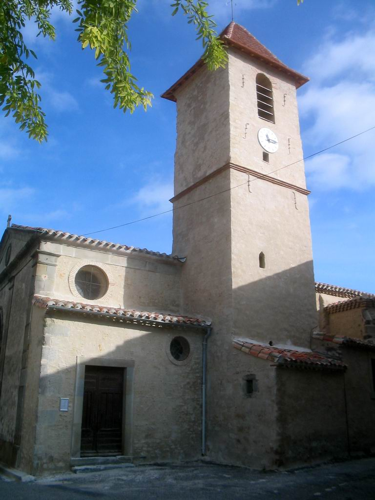 L'église de Lasserre-de-Prouille (Aude, France).